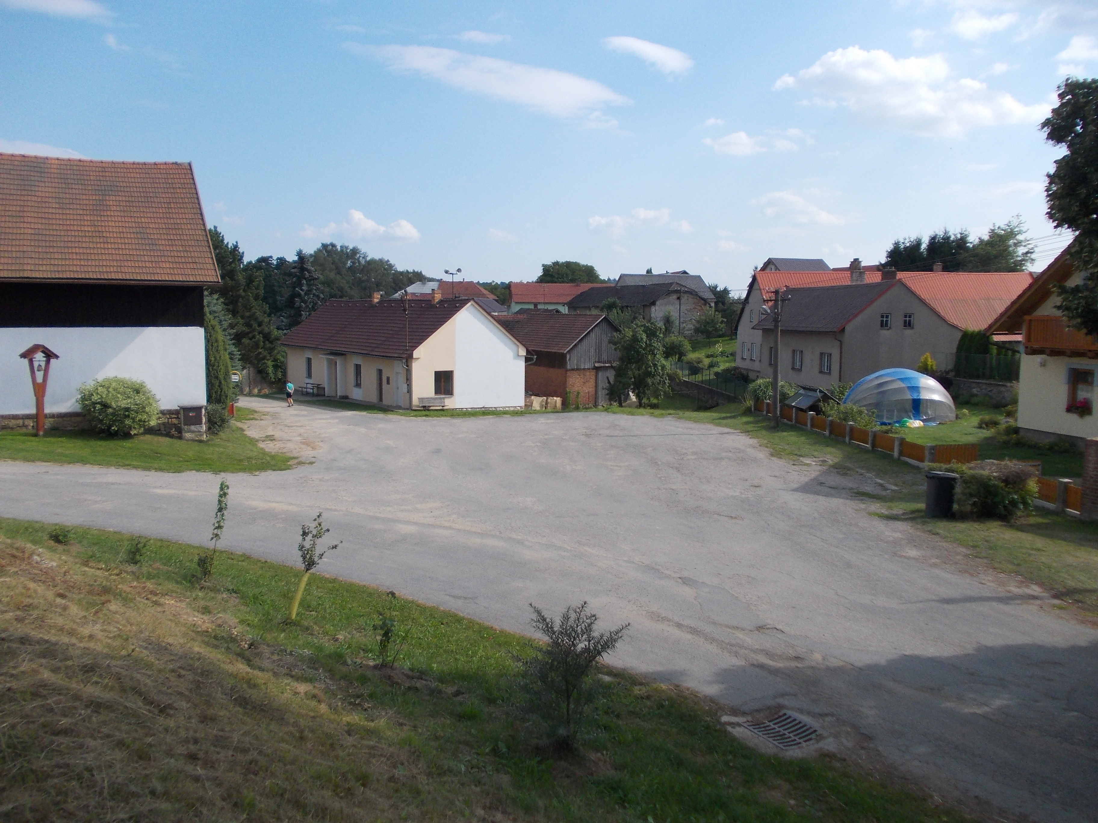 Peršíkov - náves